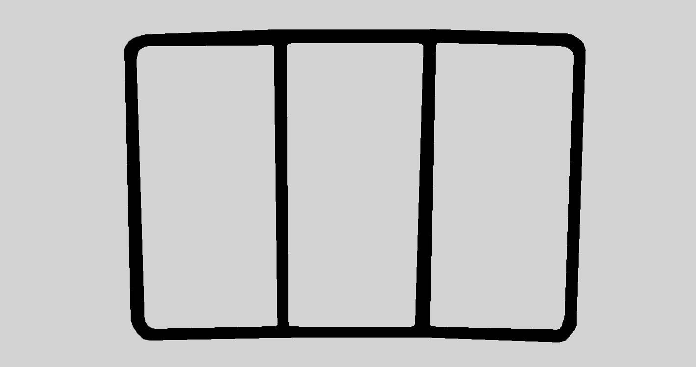 Typologie der podomorphen Petrosomatoglyphen auf Lanzarote nach Hans-Joachim Ulbrich